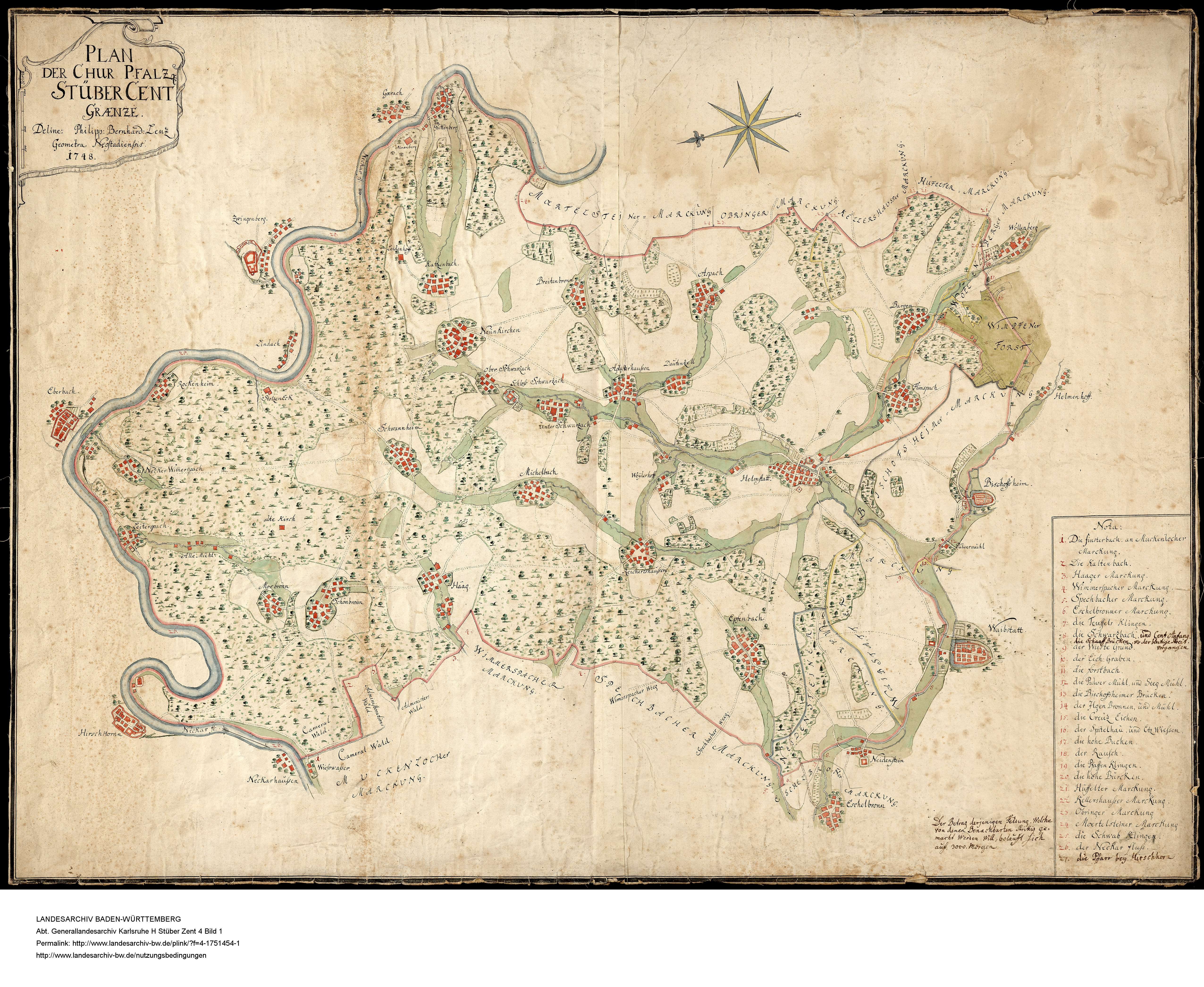 Topographische Karte, umfaßt das Gebiet links: Neckarlauf / Hirschhorn / Eberbach / Zwingenberg, rechts: Wollenberg / Helmhof / Neckarbischofsheim / Waibstadt, oben: Neckargerach, Guttenberg/ Asbach / Wollenberg, unten: Neidenstein / Eschelbronn / Neckarhausen. Grenze farbig mit Buchstaben, angrenzende Gemarkungen mit Erklärung in der Legende. Wald, Matten, Felder, Gewässer (u. a. Neckar), Straßen und Wege eingezeichnet. Häuser und Kirchen folgender Orte im Grundriß mit Gärten u. a. Leidenharterhof, "alte Kirch", Schloß Schwarzach mit Parkanlagen und Wassergraben und nicht benannte Gebäude. Am äußeren Rand der Inselkarte Wiswässerhof ("Wiswasser"), Neckarhausen, Hirschhorn (ummauert), Eberbach (ummauert), Zwingenberg (ummauerte Burg), Neckargerach, Wollenberg, Helmhof, Neckarbischofsheim (ummauert, Wassergraben), Waibstadt (ummauert mit Wassergraben), Neidenstein mit Burg und Eschelbronn eingezeichnet. Titel wie auf ein befranstes Tuch geschrieben. Maßstab hält die Titelkartusche. Mit Legende. Maße: 73,5 x 100 (Höhe x Breite) Bemerkungen: auf Leinen